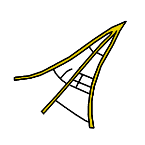 Morfología de la hoja. Diente espinoso. Según Judd et al. (2007) Plant Systematics, a Phylogenetic Approach, third edition.